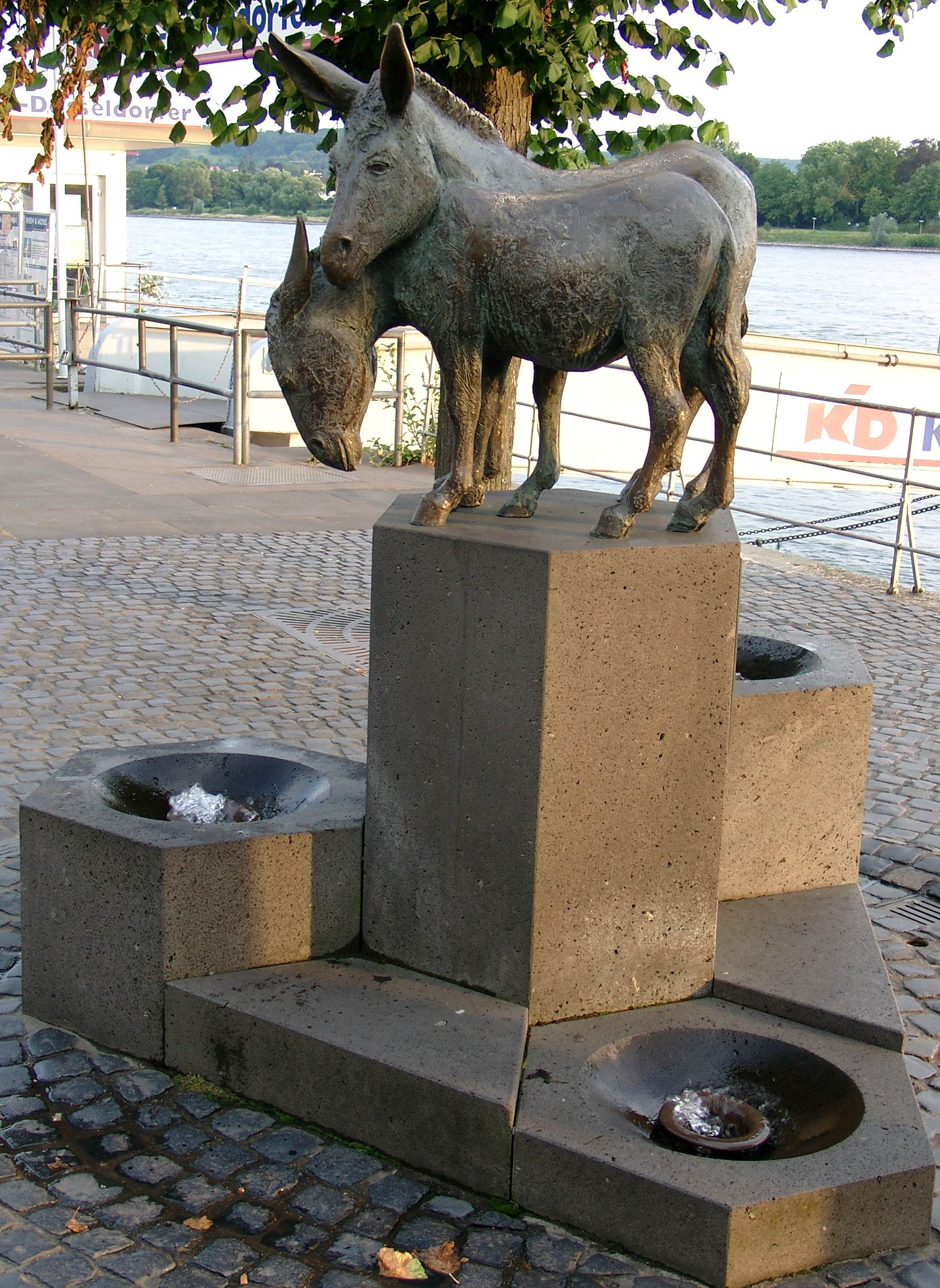 Eselsbrunnen (1984) von Ernemann Sander am Rheinufer (Rheinallee) in Königswinter